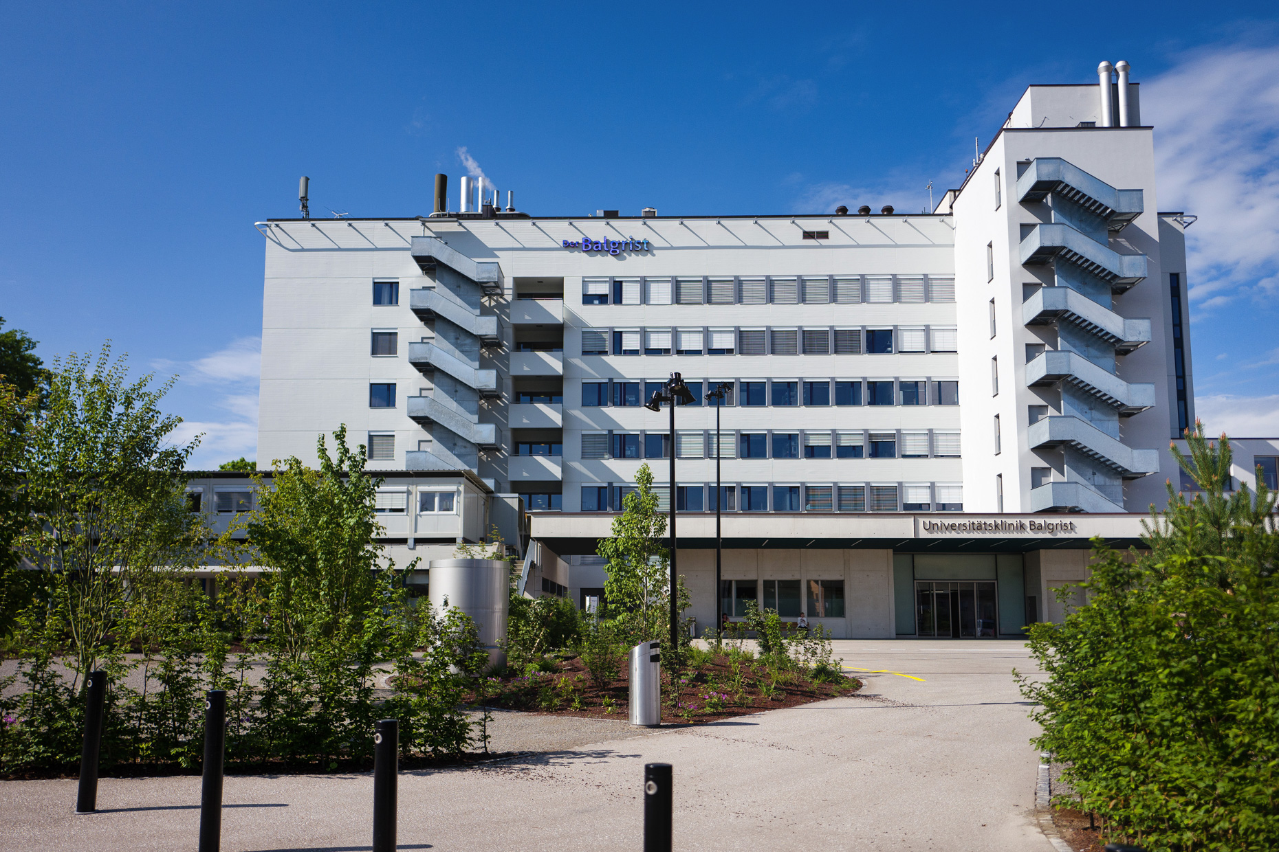 Klinikeingang mit Vorplatz und orthopädisches Bettenhaus.